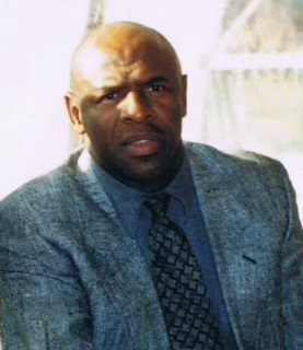 Ex futbolista brasileño